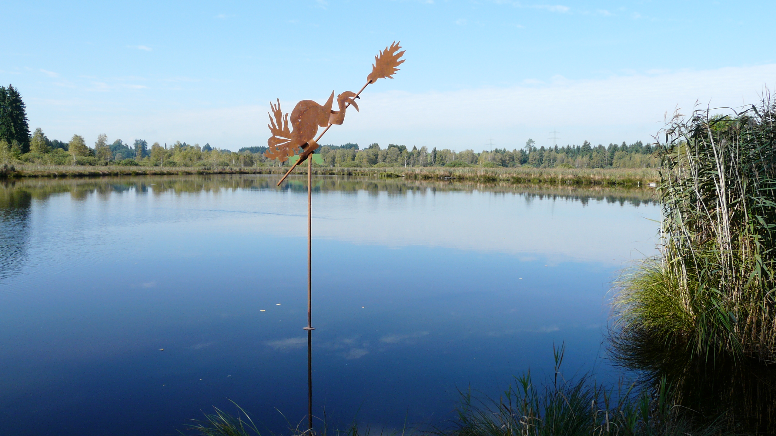 Dachssee bei Bidingen